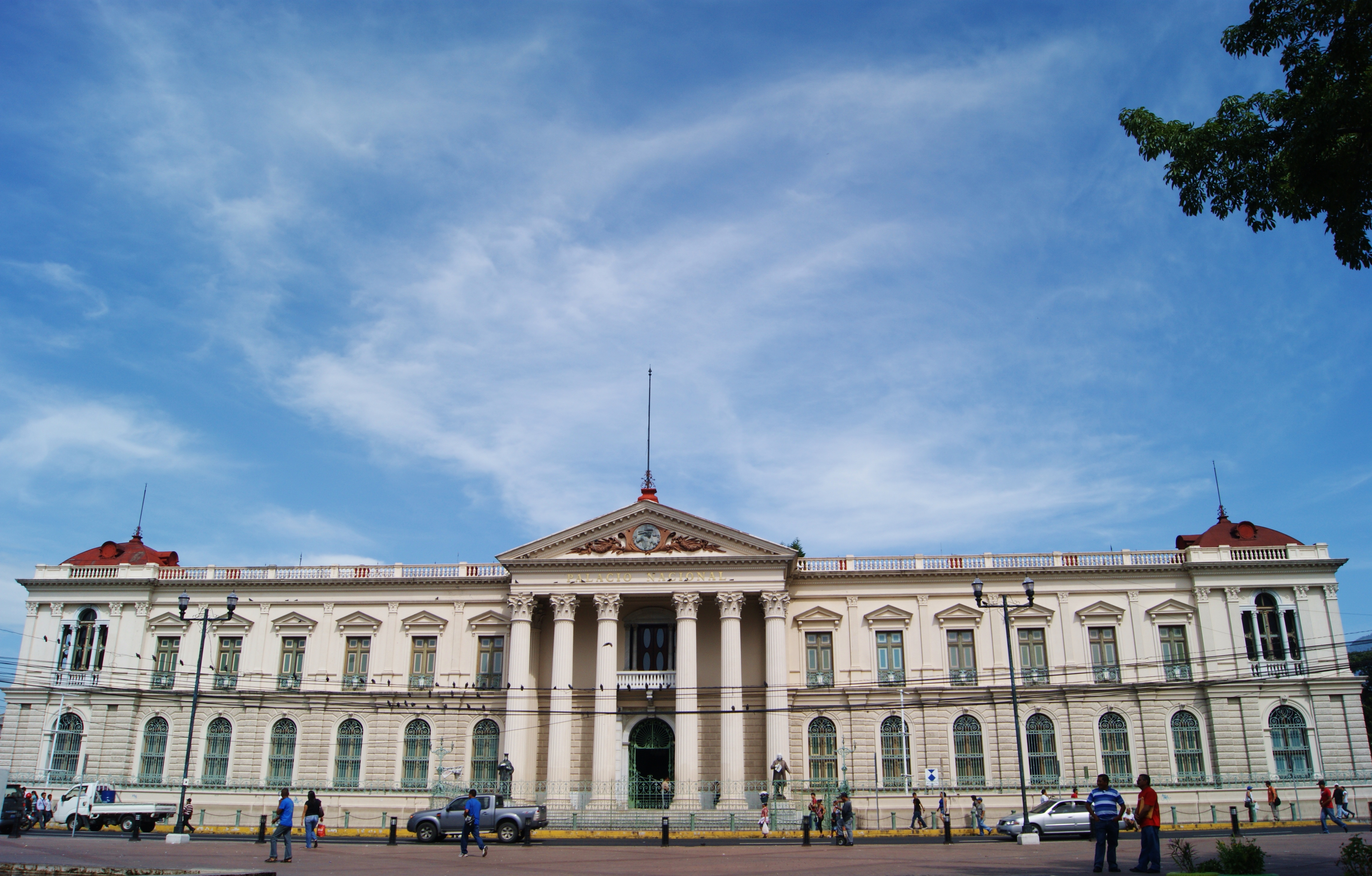 Palacio Nacional, centro histórico de El Salvador.